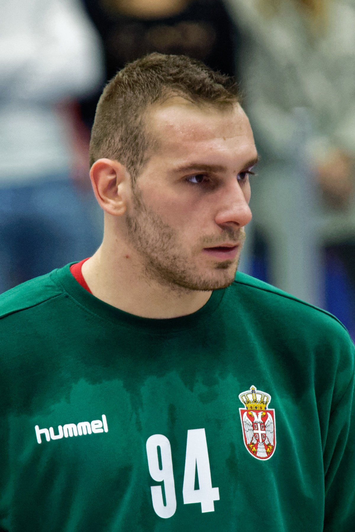 Freundschaftliches Handballspiel Österreich gegen Serbien am 28.10.2017 im BSFZ Südstadt. Bild zeigt: Vladimir Cupara